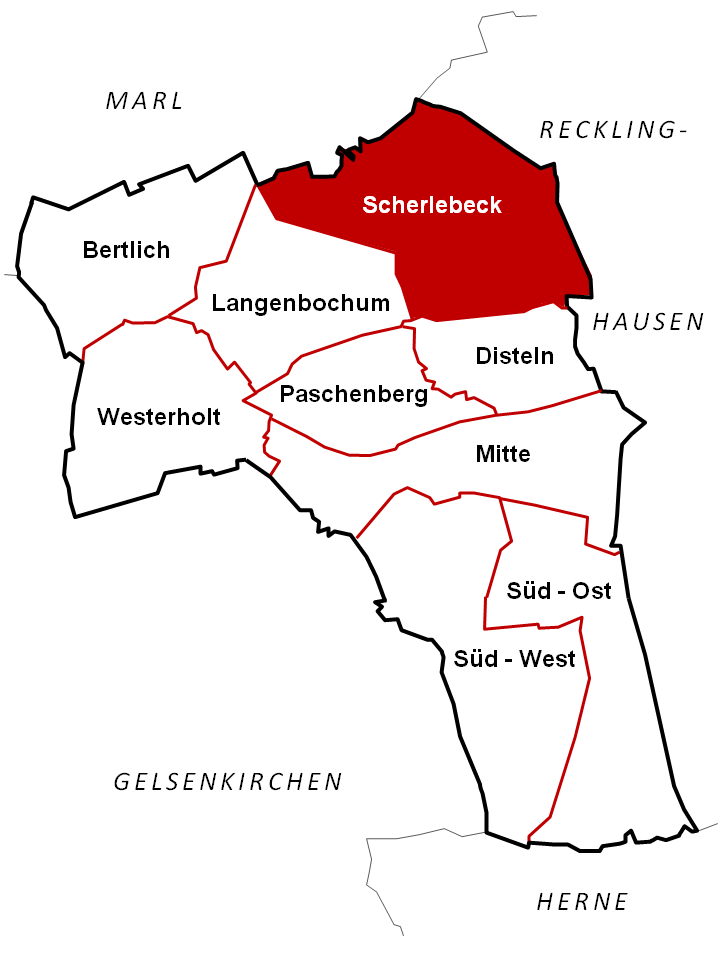 Stadtteilkarte, Scherlebeck - Herten, Nordrhein-Westfalen, Deutschland